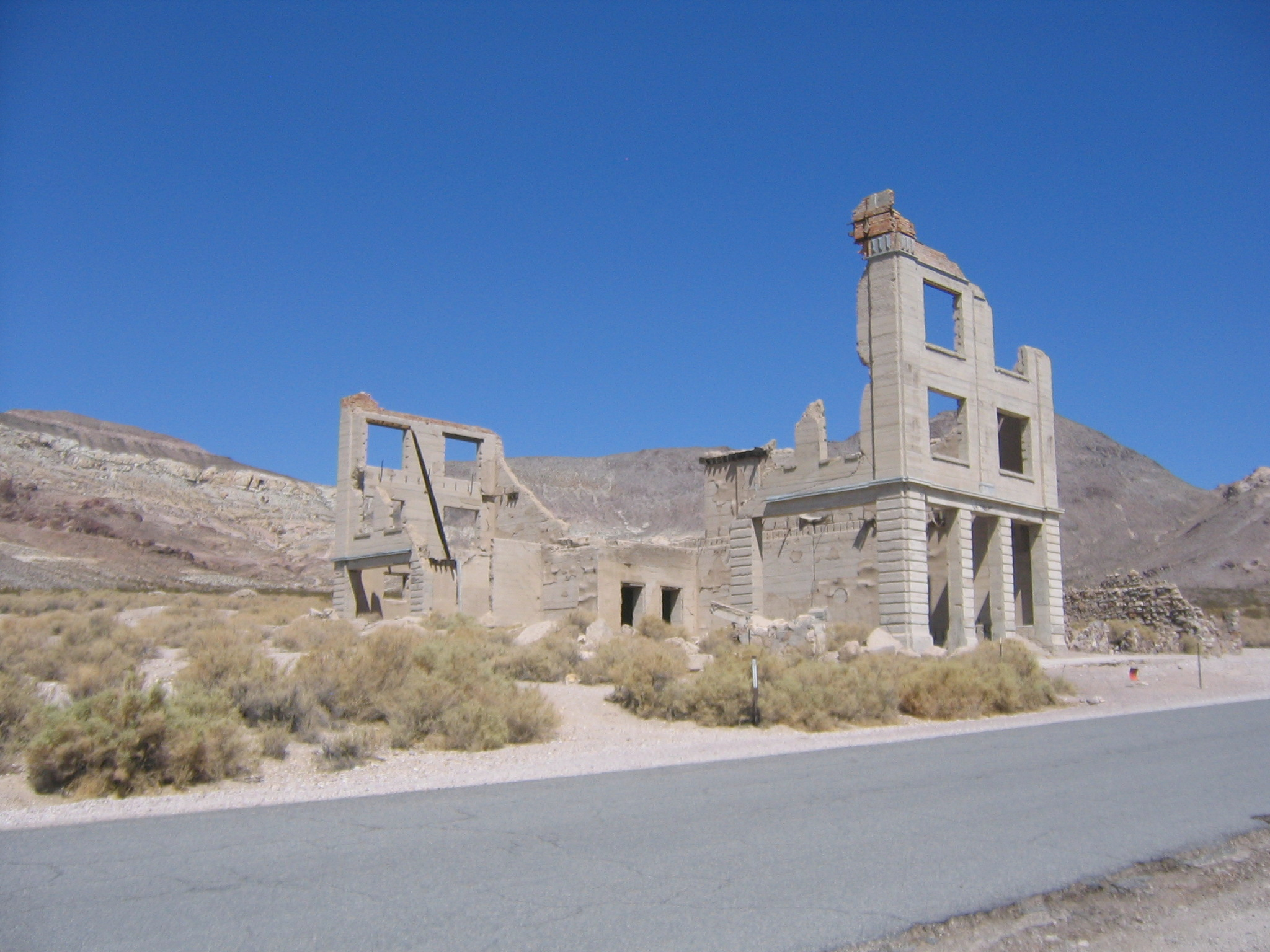 banque de Rhyolite